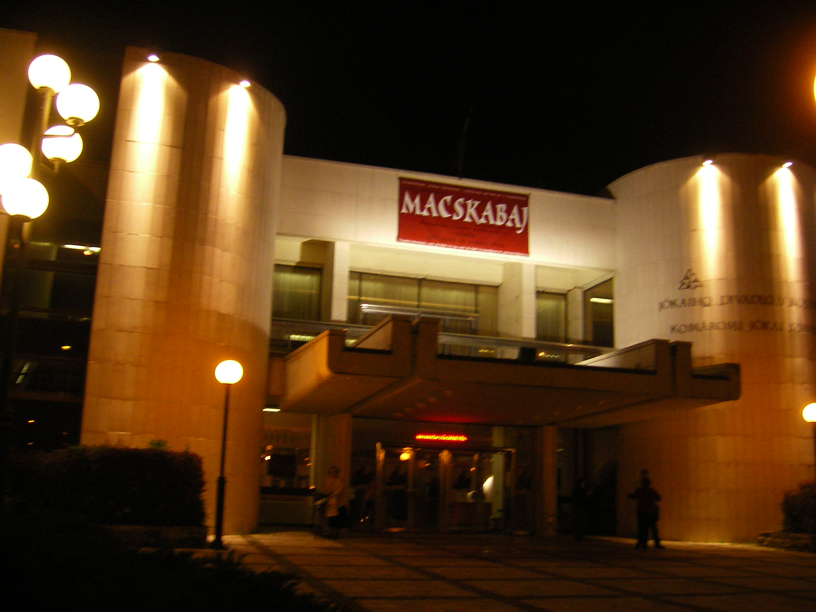 Komárom - Jókai Színház esti kivilágításban.